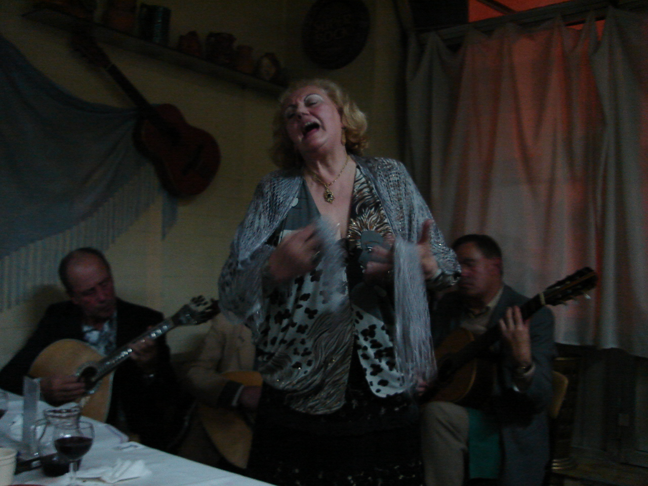 A fado singer in O Boteko, Rua Dom Manuel II, Porto, Portugal